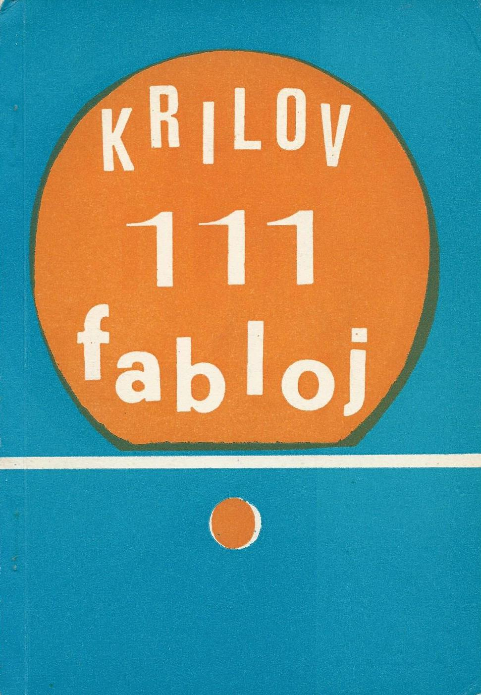 kovrilo de "111 Fabloj", 1979